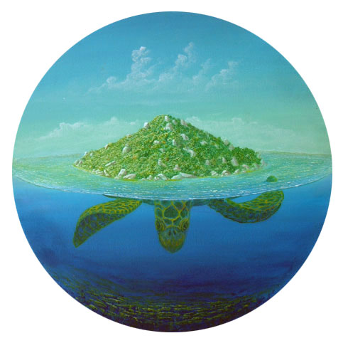 Philipp Heckmann, Maler, Die Schildkröteninsel, Mischtechnik, Ø 50cm